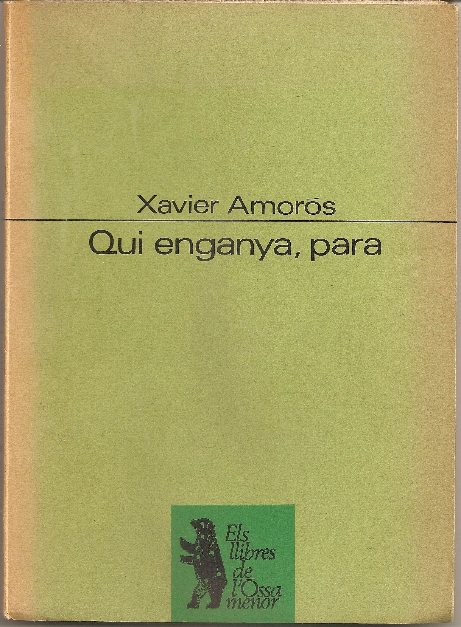 Coberta del llibre de Xavier Amorós Qui enganya, para